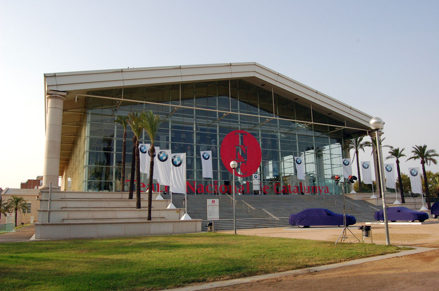 Theatre national de Catalogne (Barcelone, Catalogne, Espagne)